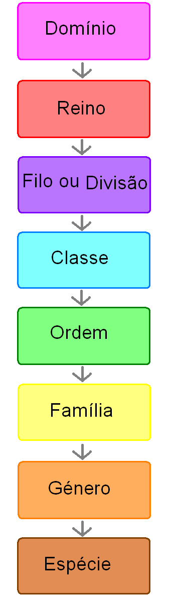 Scientific classification (Portuguese version.